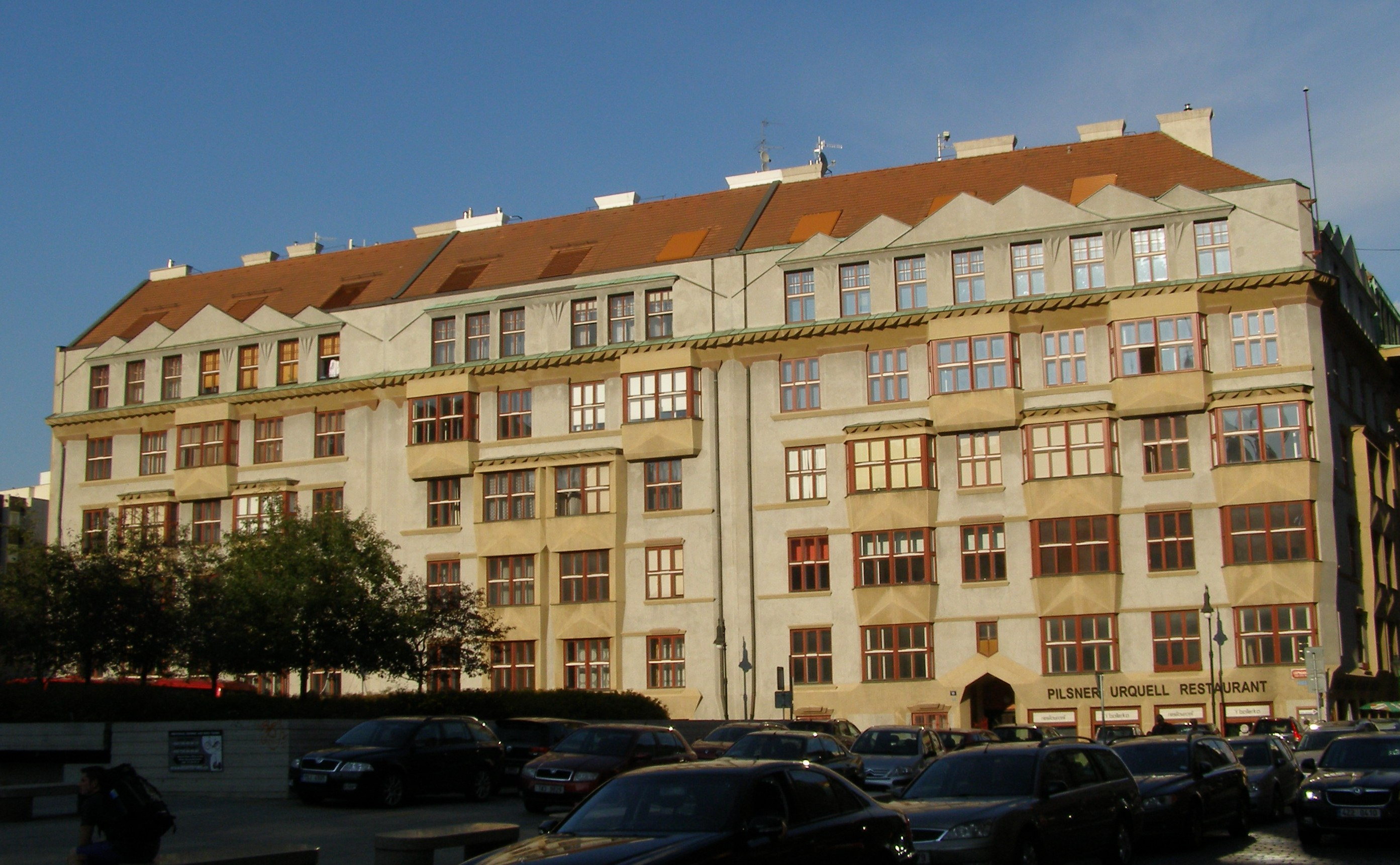 Činžovní dům "Učitelské domy" (Staré Město), Praha 1, Elišky Krásnohorské 123/10, Staré Město